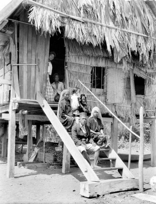 Negatief. Een gezin van Soembawa op de trap van zijn woning